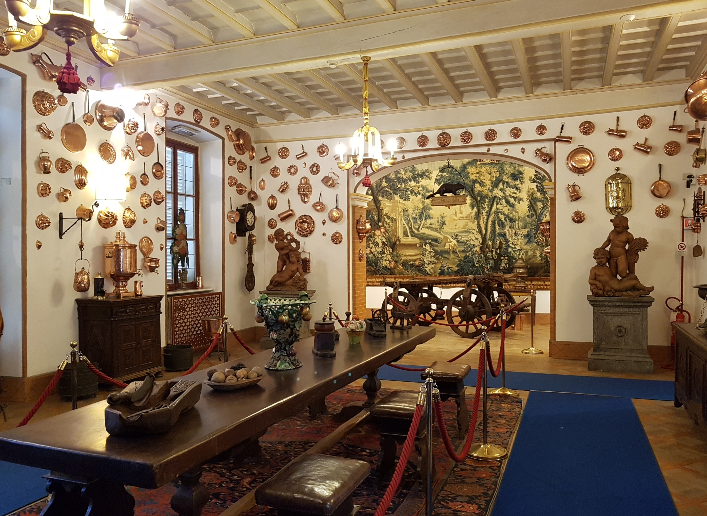 Cucina, Museo di Arti Decorative Accorsi–Ometto, Torino